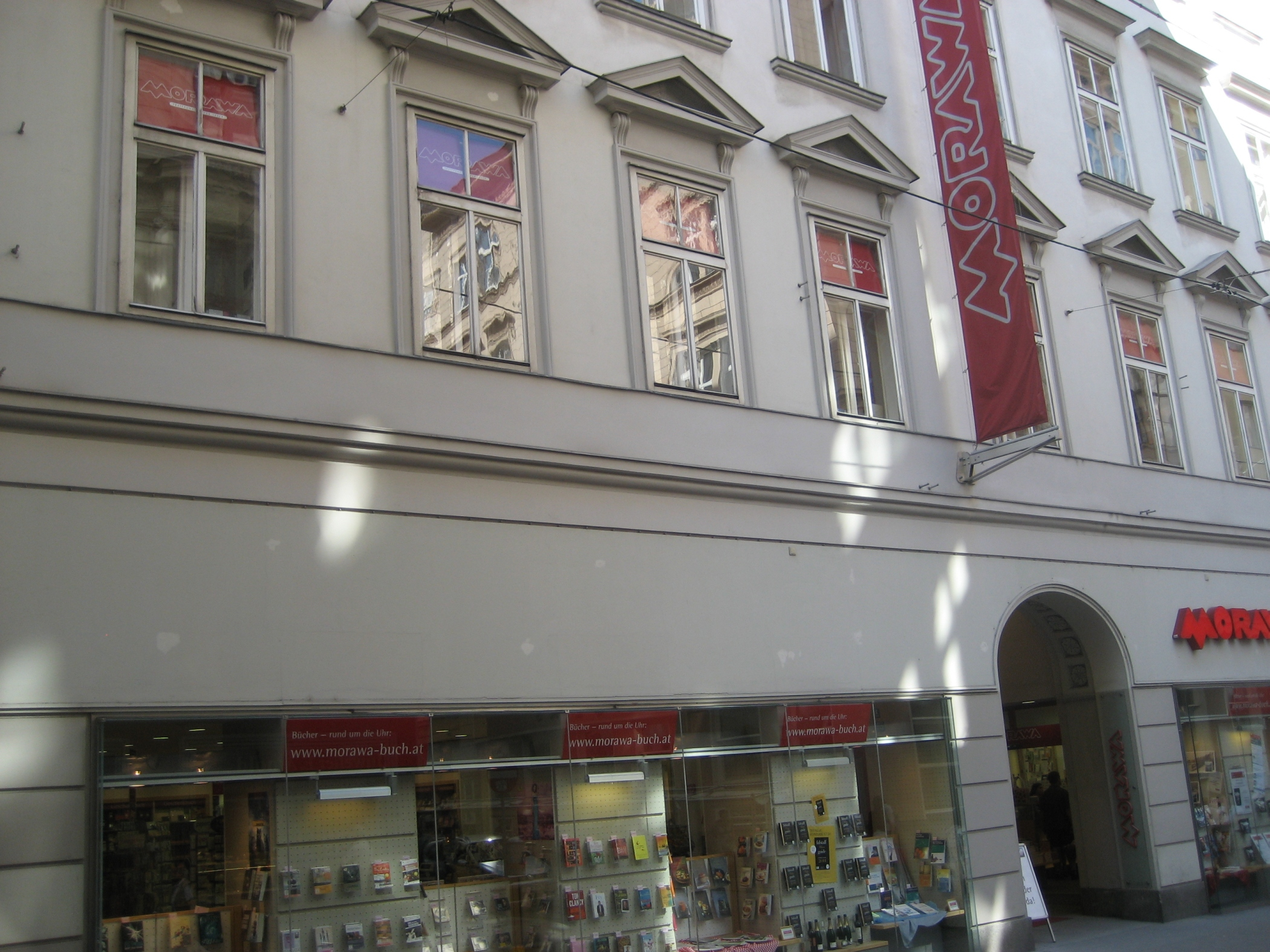 das Haus Wollzeile 11 im 1. Bezirk, in Wien